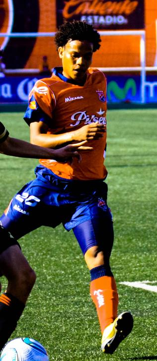 Mexico vs independiente de Medellin, partido de la seleccion mexicana jugado en el estadio Caliente de Tijuana, mas info videos y fotos en